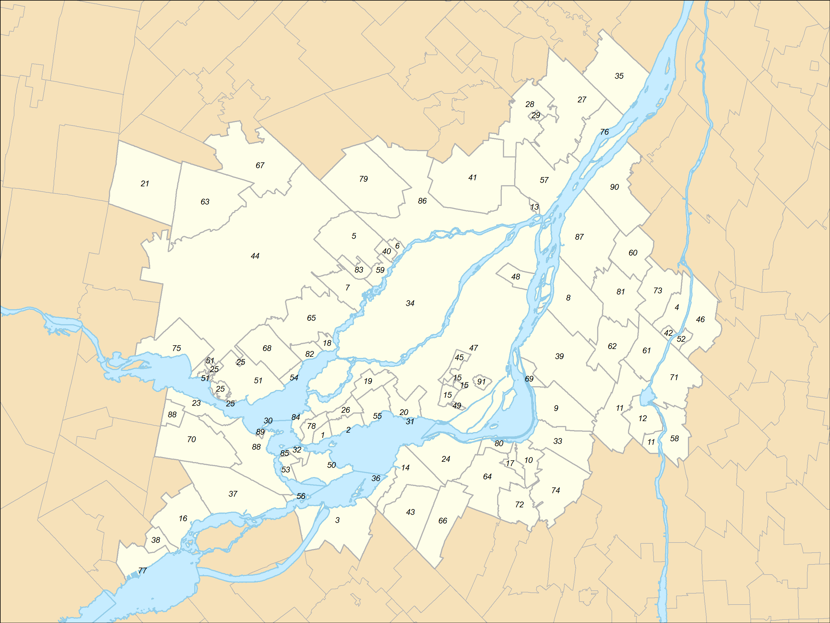 Découpage des municipalités de la région métropolitaine de recensement de Montréal selon le recensement de 2011 1. Baie-D'Urfé 2. Beaconsfield 3. Beauharnois 4. Belœil 5. Blainville 6. Bois-des-Filion 7. Boisbriand 8. Boucherville 9. Brossard 10. Candiac 11. Carignan 12. Chambly 13. Charlemagne 14. Châteauguay 15. Côte-Saint-Luc 16. Coteau-du-Lac 17. Delson 18. Deux-Montagnes 19. Dollard-Des Ormeaux 20. Dorval 21. Gore 22. Hampstead 23. Hudson 24. Kahnawake 25. Kanesatake 26. Kirkland 27. L'Assomption 28. L'Épiphanie (ville) 29. L'Épiphanie (paroisse) 30. L'Île-Cadieux 31. L'Île-Dorval 32. L'Île-Perrot 33. La Prairie 34. Laval 35. Lavaltrie 36. Léry 37. Les Cèdres 38. Les Coteaux 39. Longueuil 40. Lorraine 41. Mascouche 42. McMasterville 43. Mercier 44. Mirabel 45. Mont-Royal 46. Mont-Saint-Hilaire 47. Montréal 48. Montréal-Est 49. Montréal-Ouest 50. Notre-Dame-de-l'Île-Perrot 51. Oka 52. Otterburn Park 53. Prévost 54. Piedmont 55. Pincourt 56. Pointe-Calumet 57. Pointe-Claire 58. Pointe-des-Cascades 59. Repentigny 60. Richelieu 61. Rosemère 62. Saint-Amable 63. Saint-Basile-le-Grand 64. Saint-Bruno-de-Montarville 65. Saint-Colomban 66. Saint-Constant 67. Saint-Eustache 68. Saint-Hippolyte 69. Saint-Isidore 70. Saint-Jérôme 71. Saint-Joseph-du-Lac 72. Saint-Lambert 73. Saint-Lazare 74. Saint-Mathias-sur-Richelieu 75. Saint-Mathieu 76. Saint-Mathieu-de-Belœil 77. Saint-Philippe 78. Saint-Placide 79. Saint-Sauveur 80. Saint-Sulpice 81. Saint-Zotique 82. Sainte-Adèle 83. Sainte-Anne-de-Bellevue 84. Sainte-Anne-des-Lacs 85. Sainte-Anne-des-Plaines 86. Sainte-Catherine 87. Sainte-Julie 88. Sainte-Marthe-sur-le-Lac 89. Sainte-Sophie 90. Sainte-Thérèse 91. Senneville 92. Terrasse-Vaudreuil 93. Terrebonne 94. Varennes 95. Vaudreuil-Dorion 96. Vaudreuil-sur-le-Lac 97. Verchères 98. Westmount